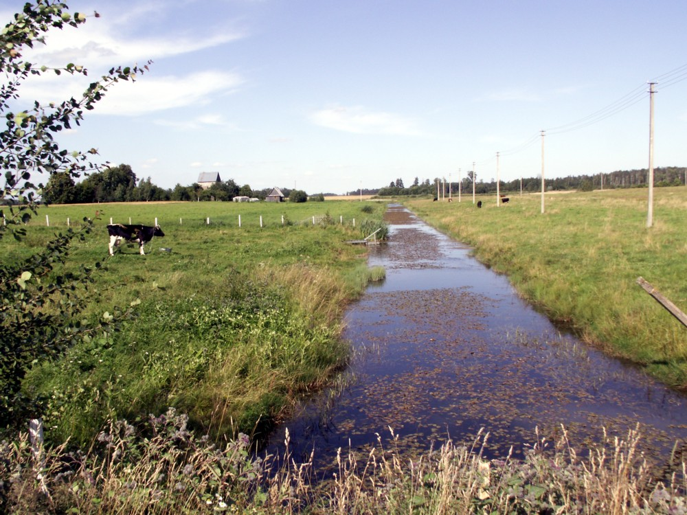 Amalė ties Džuikais